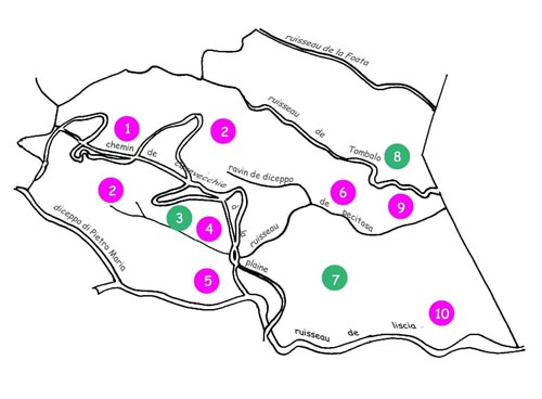 relevé toponymique